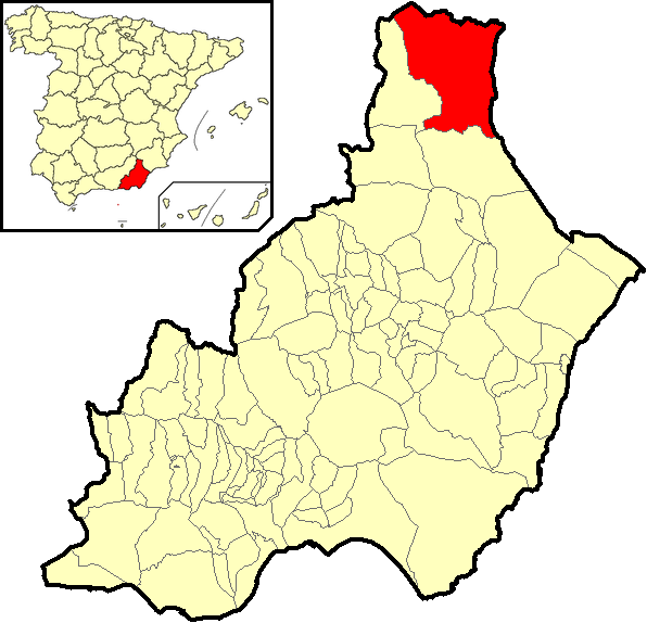 Situación del término municipal de Vélez-Blanco respecto a la provincia de Almería, en España.